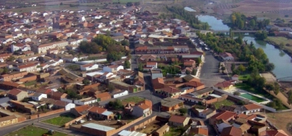 Vista panorámica de El Robledo. Ciudad Real. España.